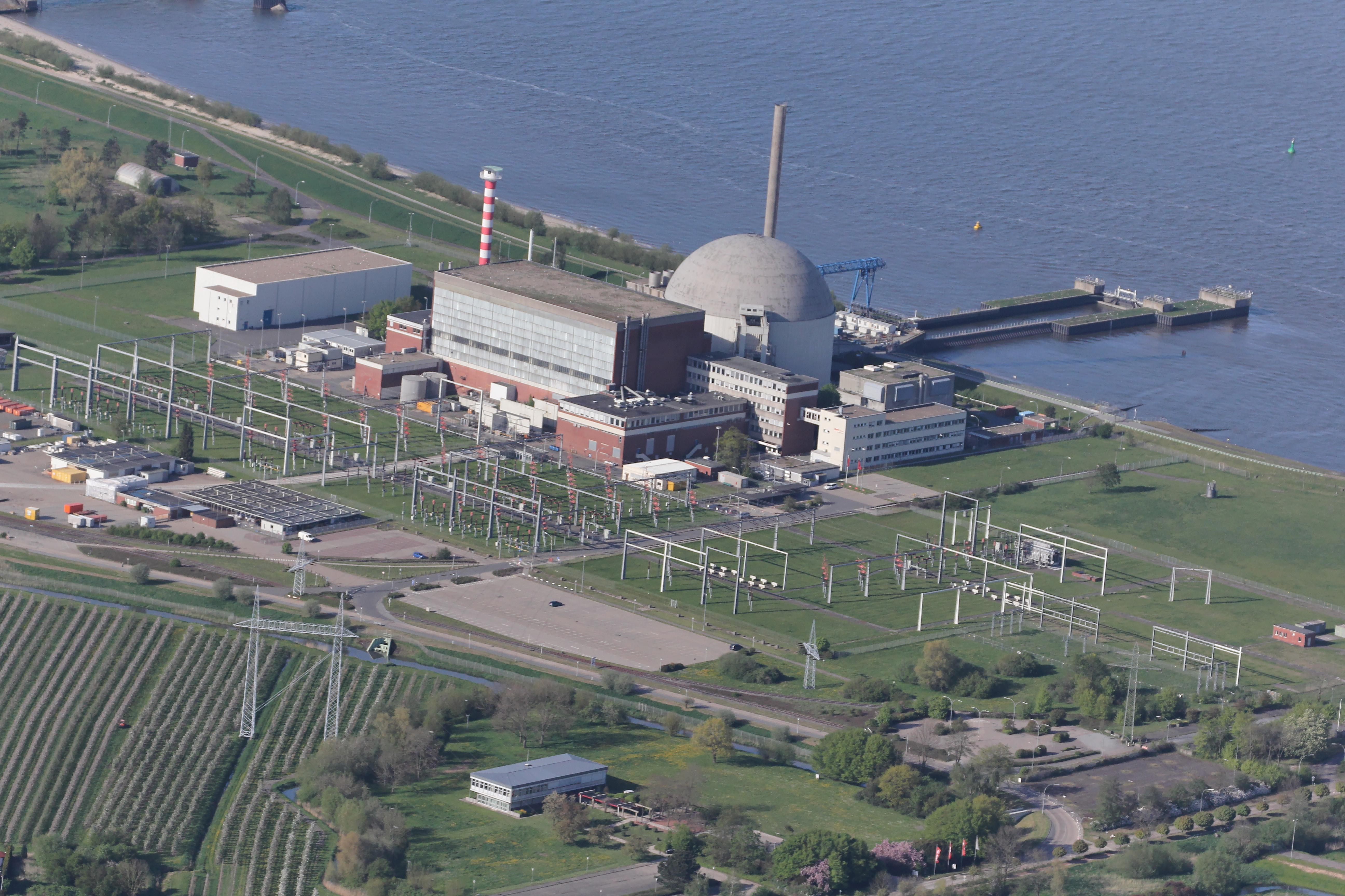 Luftaufnahme: das Kernkraftwerk Stade von Südosten